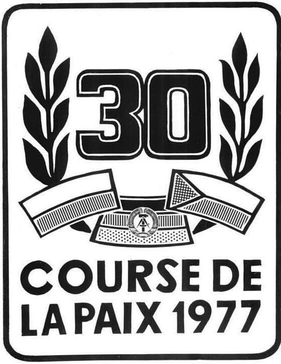 Logo der 30. Internationalen Friedensfahrt ADN-ZB 9.2.77- ma Berlin :Das offizielle Emblem der 30.Internationale Friedensfahrt Warschau-Berlin-Prag vom 8.-21.Mai 1977.